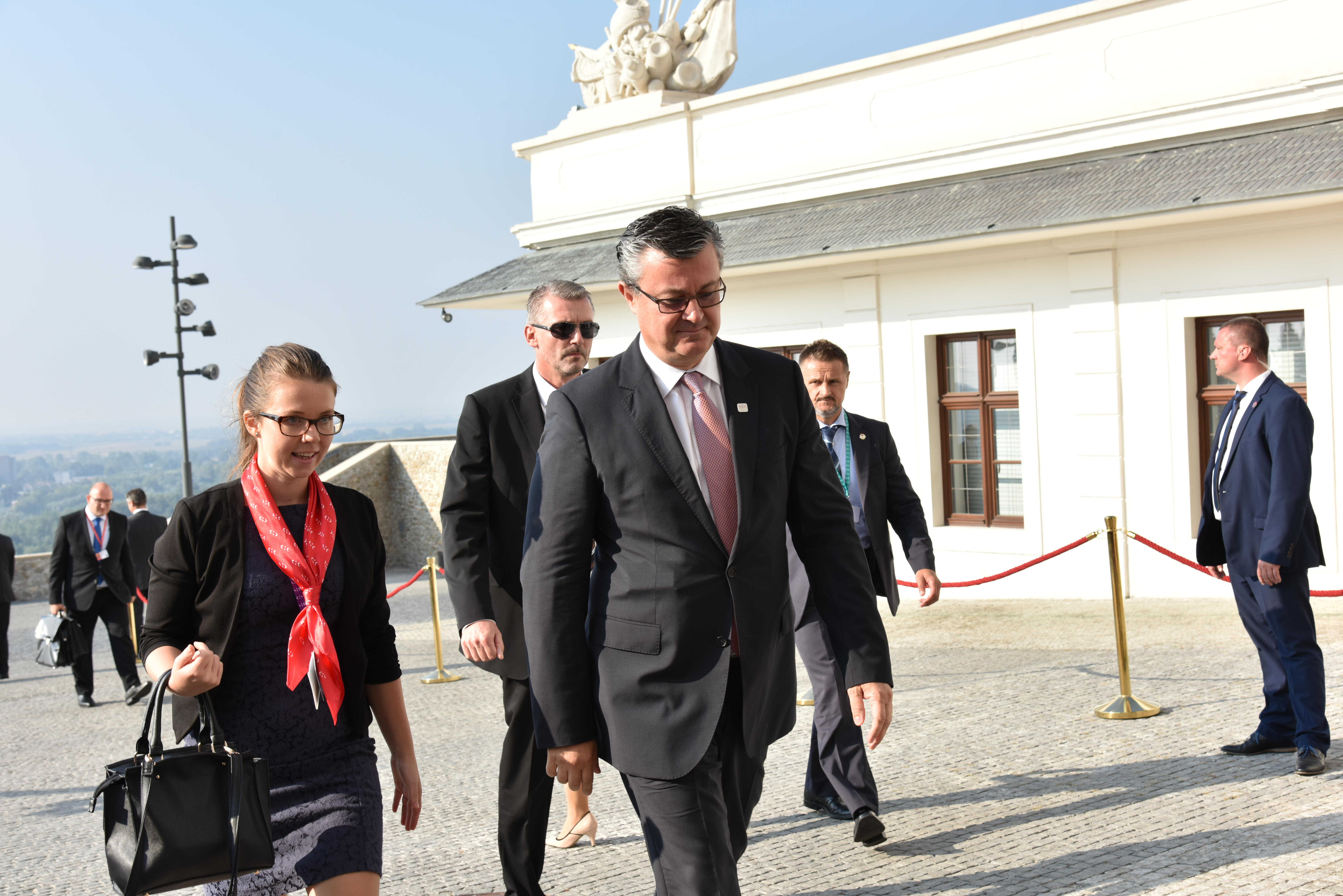 BRATISLAVA SUMMIT 16 SEPTEMBER 2016 ph halime sarrag